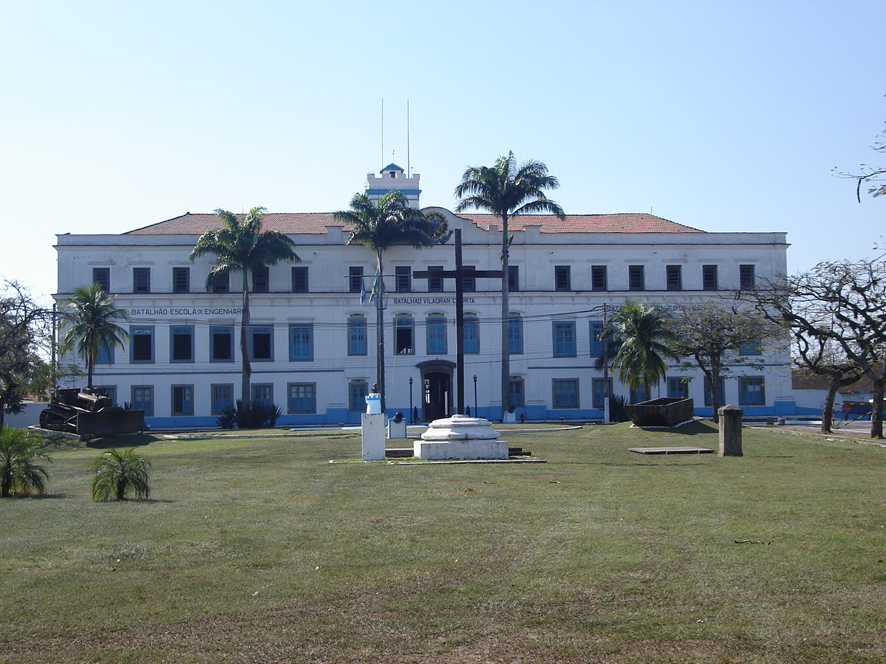 Batalhão escola de Engenharia Vilagran Cabrita, Santa Cruz, Rio de Janeiro, RJ